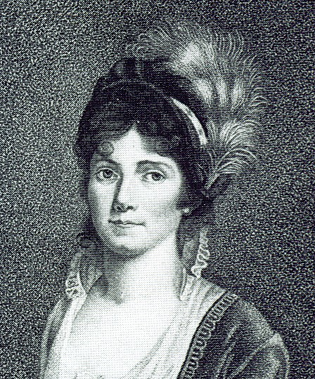 Karoline Friederike Wilhelmine, Prinzessin von Baden Nach Ablauf des Trauerjahres heiratete Max Joseph am 9. März 1797 in Karlsruhe Karoline Friederike Wilhelmine, Prinzessin von Baden. Karoline wurde die erste bayrische Königin.